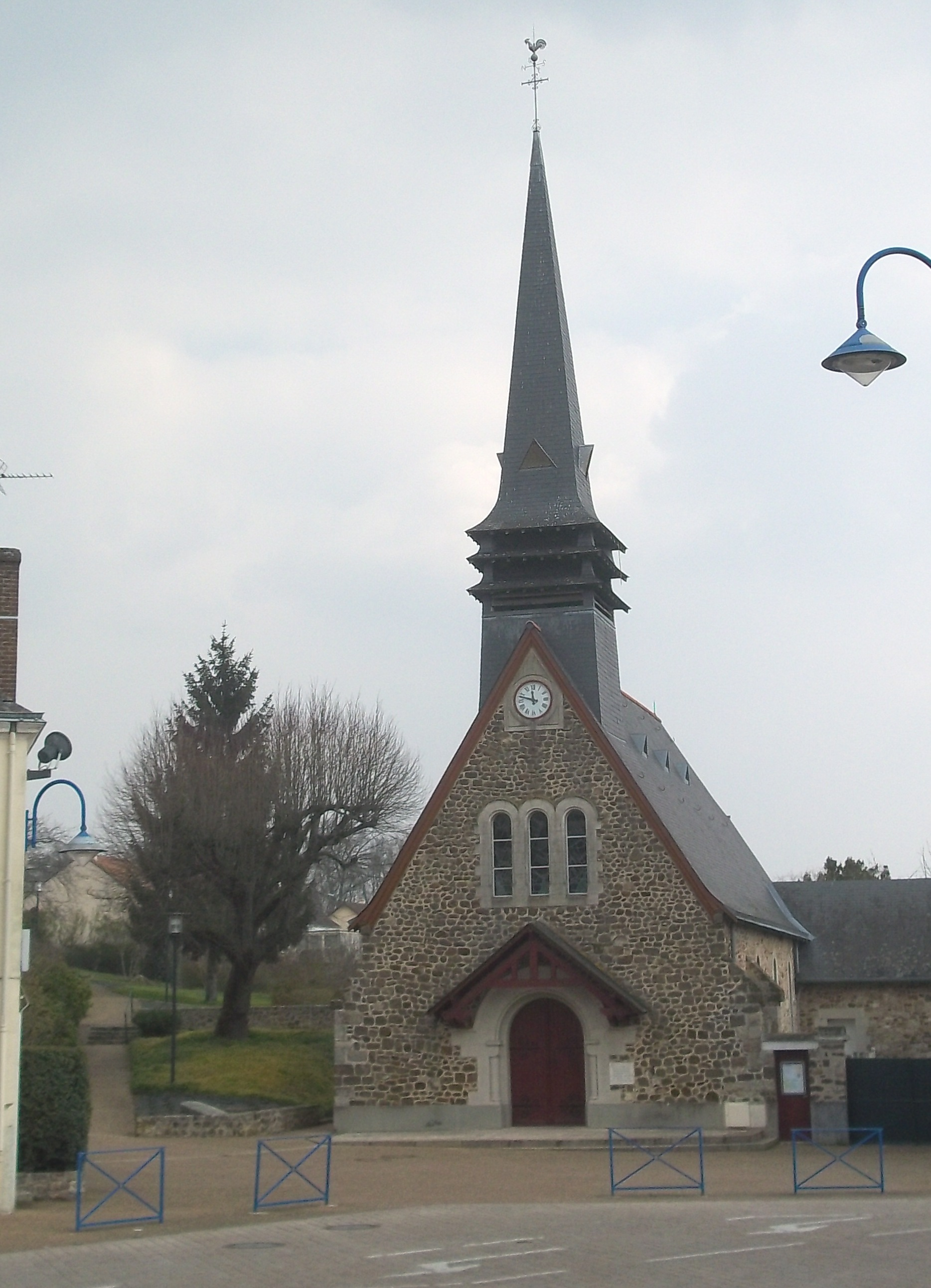 La Chapelle Saint Aubin - l'église